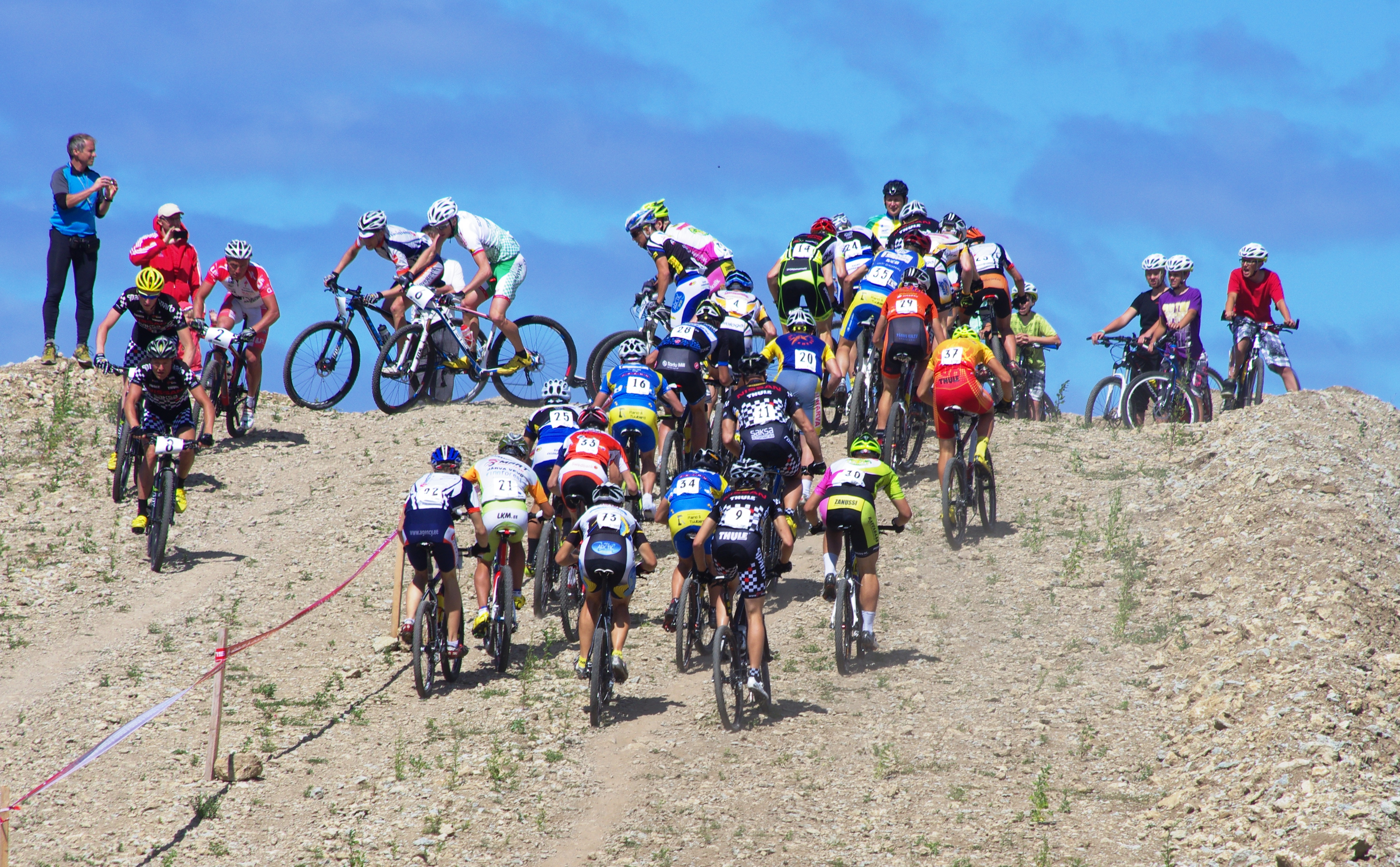 Jalgrattasport Keilas.